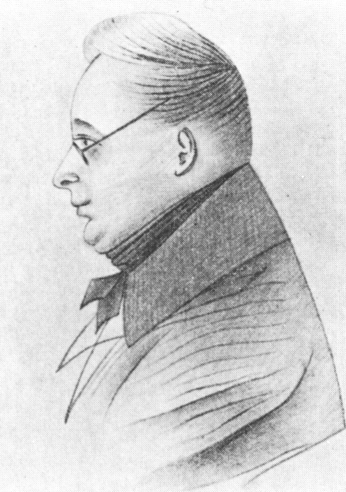 Karl Otto Freiherr von Manteuffel (1806–1879) preußischer Landwirtschaftsminister 1854–58